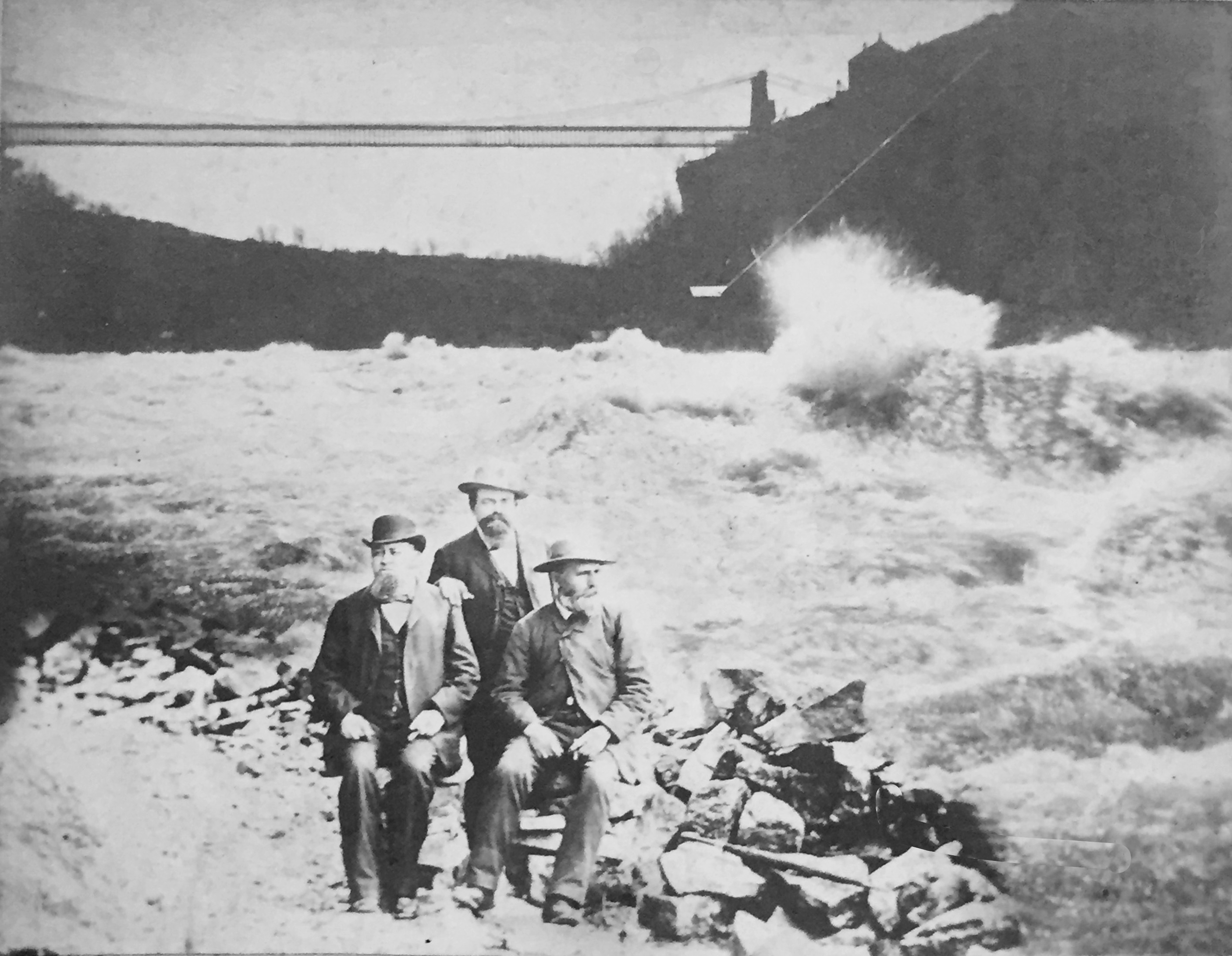 Niagra River and Niagara Falls Suspension Bridge, Simon Friedrich Schill (right), Jakob Gruen et al.